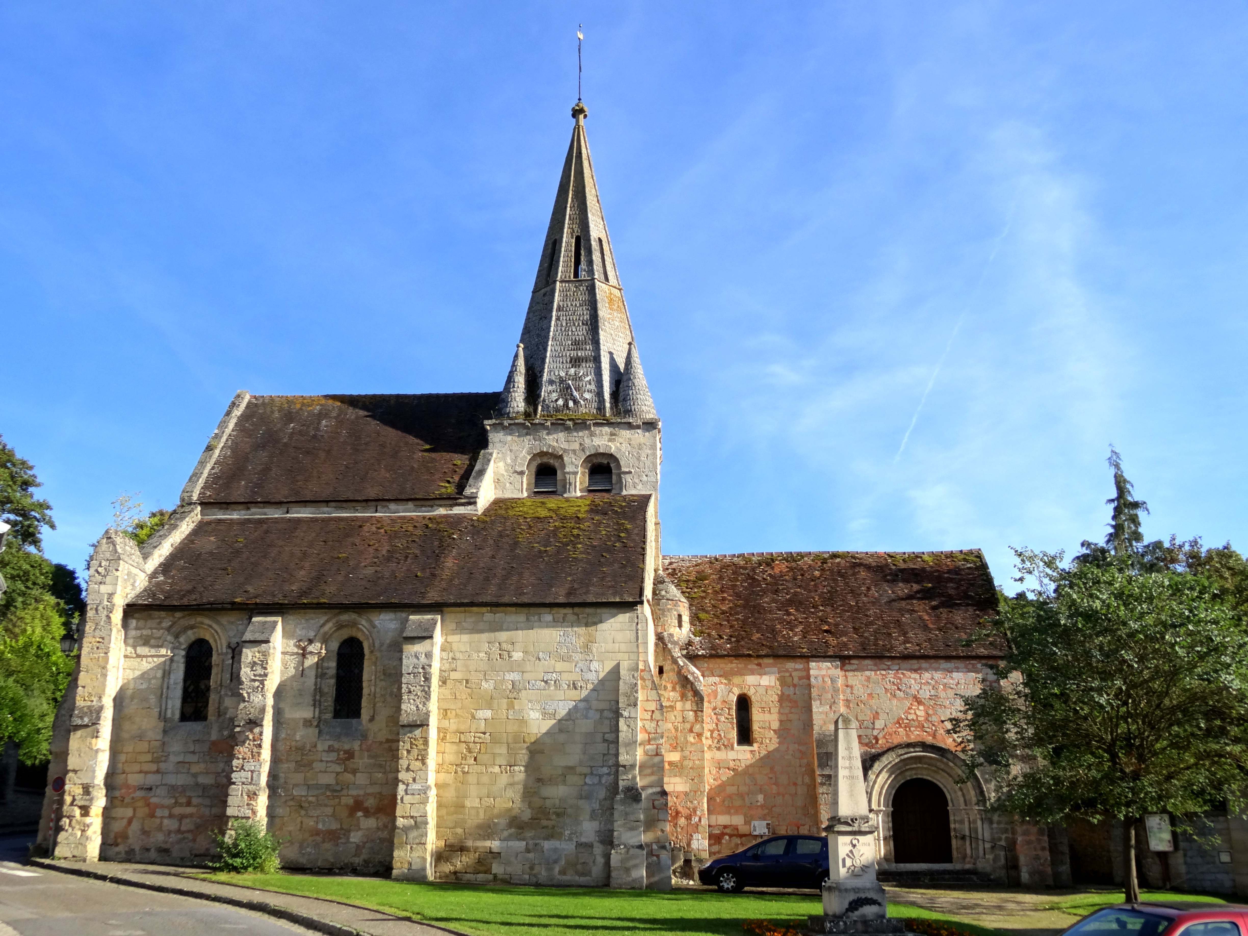 Église Notre-Dame-de-l'Assomption de Gaillon-sur-Montcient - voir titre.